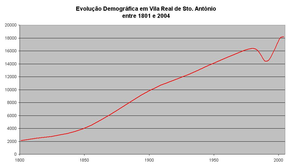 Evolução demográfica no concelho de Vila Real de Santo António entre 1801 e 2004.